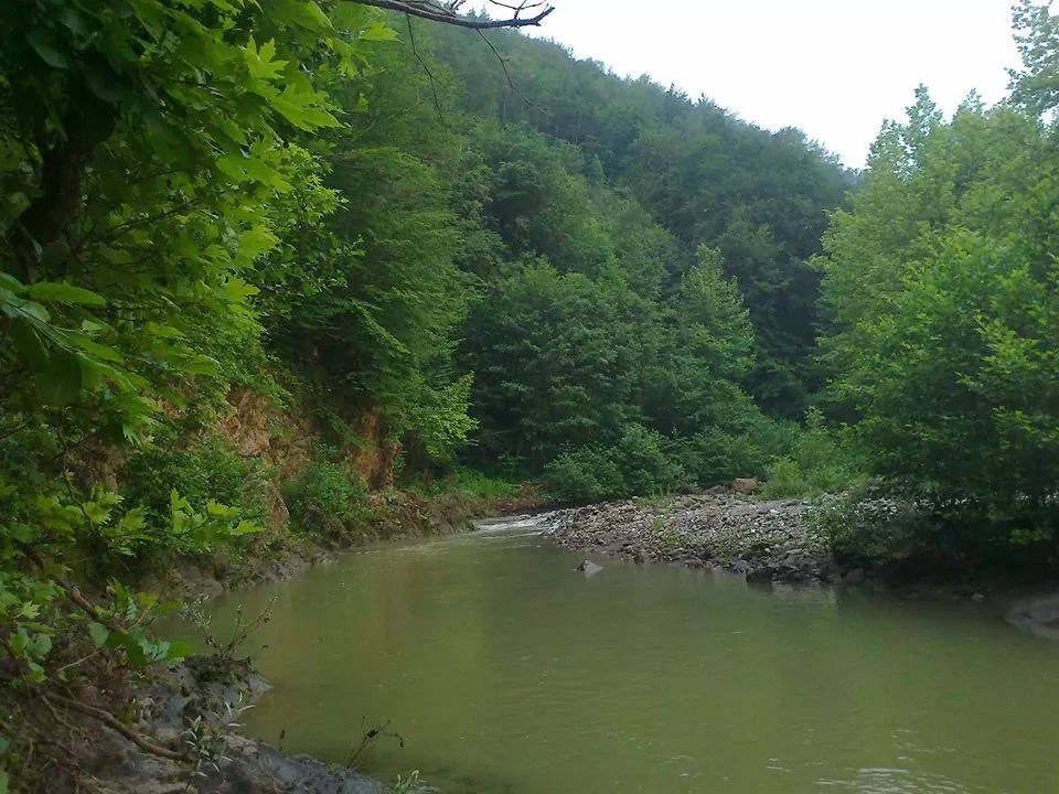 Küre Dağları Güllüce Köyü Kanyonu